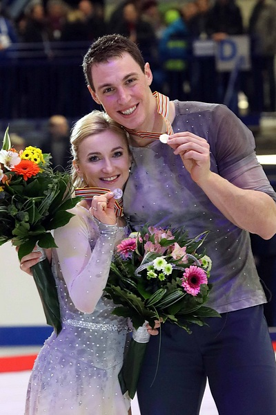 Алена Савченко и Бруно Массо на подиуме чемпионата Европы 2017 года